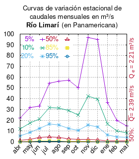 Curvas de variación estacional del río Limarí en Panamericana. # Dirección General de Aguas # Diagnóstico y clasificación de los cursos y cuerpos de agua según objetivos de calidad. Cuenca del río Limarí. # Santiago de Chile # Ministerio de Obras Públicas (Chile) # 2004 # url: # urlarchivo: # Tabla 4.16: Río Limarí en Panamericana, p.60 mes 5% 10% 20% 50% 85% 95% abr 22.348 11.976 5.625 1.327 0.224 0.079 may 31.774 17.728 8.744 2.265 0.429 0.161 jun 33.262 21.361 12.441 4.311 1.006 0.314 jul 54.240 31.732 16.573 4.783 1.027 0.410 ago 56.172 31.419 15.547 4.047 0.771 0.292 sep 57.189 28.882 12.623 2.590 0.361 0.109 oct 50.410 25.115 10.800 2.153 0.295 0.092 nov 96.817 42.308 15.542 2.329 0.268 0.107 dic 94.946 39.750 13.860 1.876 0.189 0.072 ene 36.300 16.406 6.283 1.027 0.139 0.063 feb 19.663 10.119 4.526 0.972 0.146 0.048 mar 14.715 8.105 3.936 0.990 0.181 0.067 This plot was created with Gnuplot.